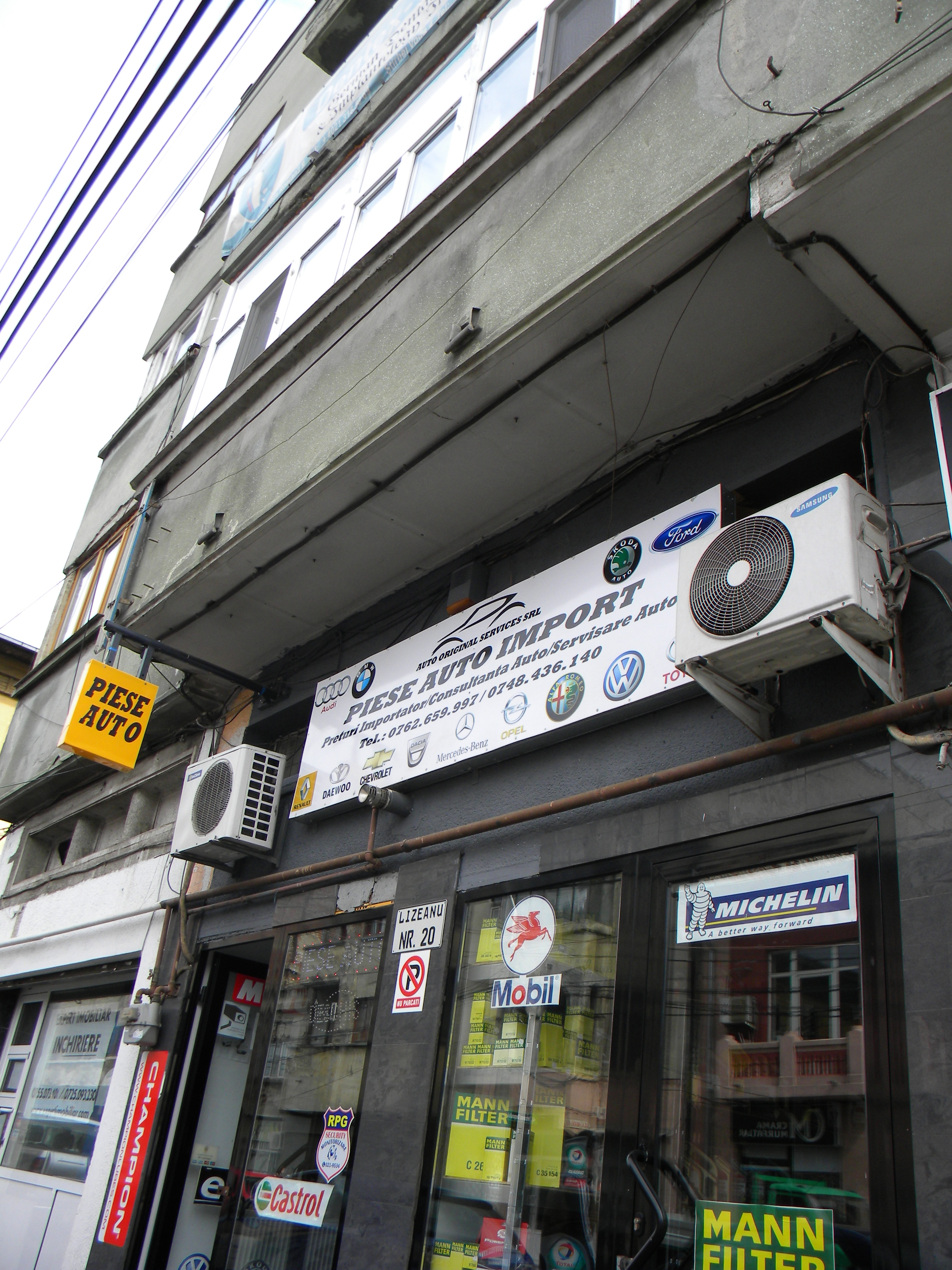 Bucuresti, Romania, Casa pe Str. Lizeanu nr. 20, sect. 2